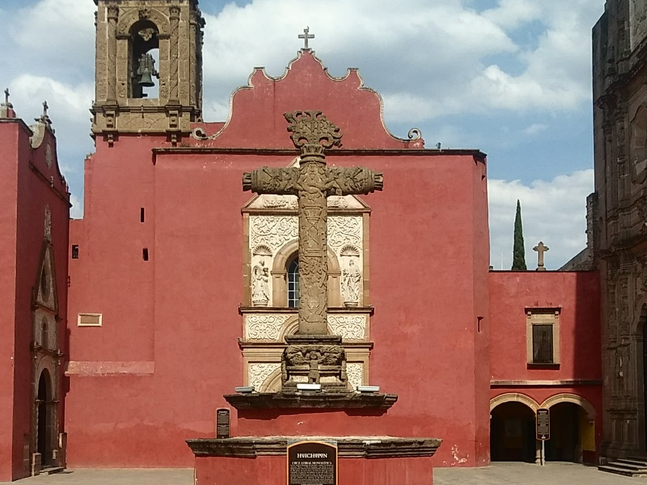 Parroquía de San Mateo Apostol, Huichapan, Hidalgo, México.